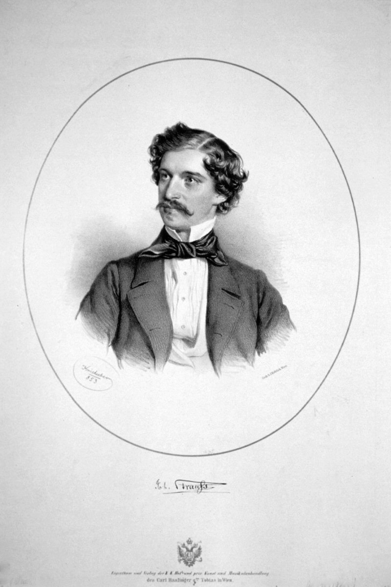 Johann Strauß (Sohn), Lithographie von Josef Kriehuber, 1853